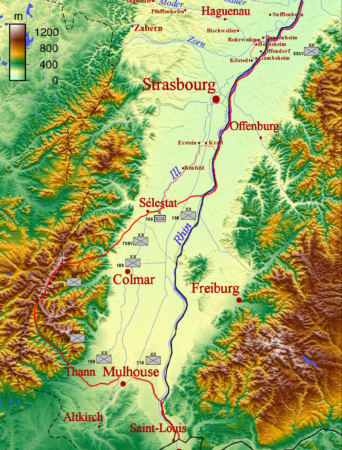 Geländegewinne der 19.Armee vom 1.-12.Januar 1945